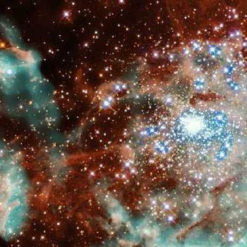 Скопление NGC 2070 молодых массивных звёзд в центре газовой туманности Тарантул.